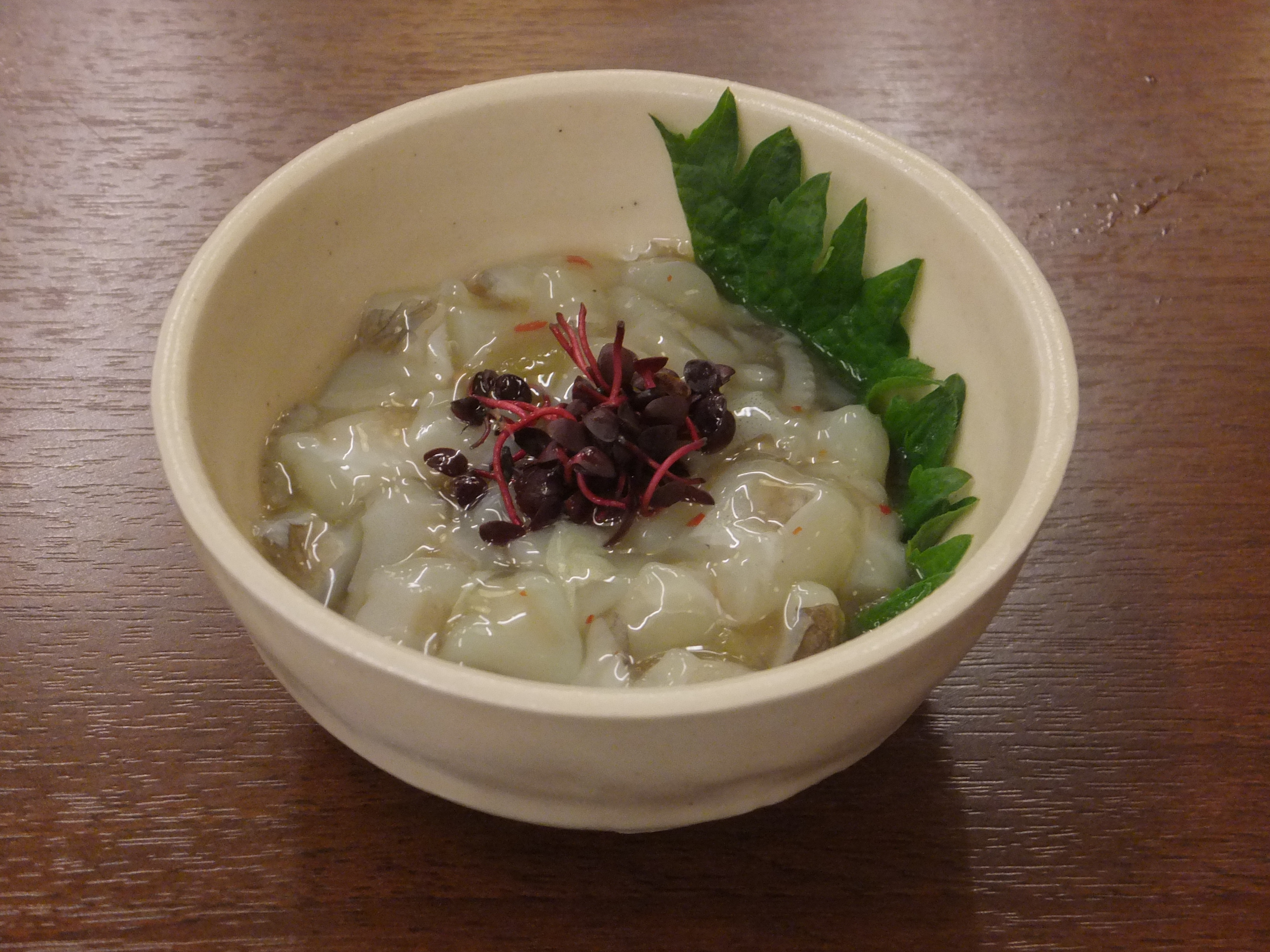 塩辛の一種、たこわさび